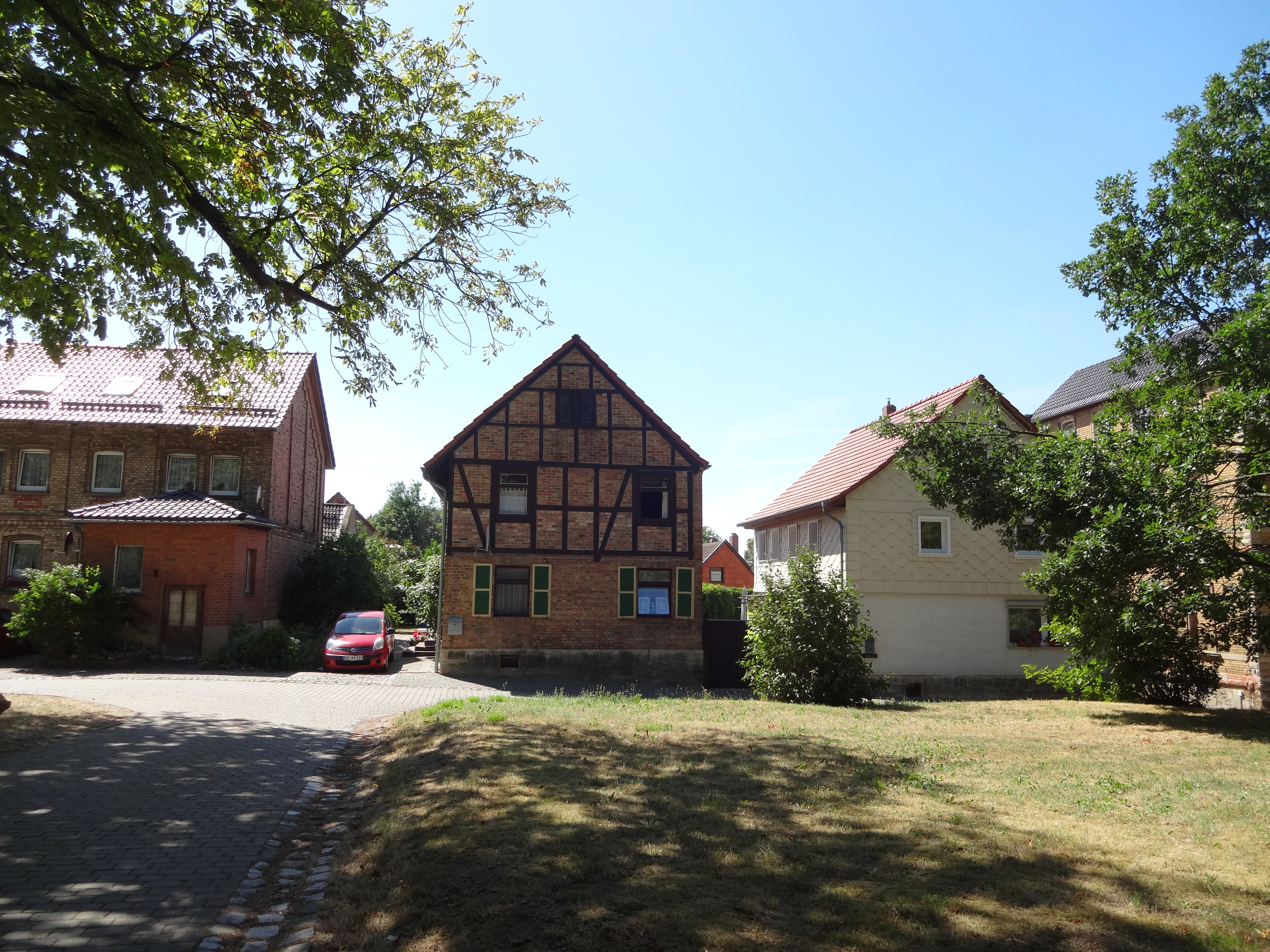 denkmalgeschütztes Bauernhaus in der Straße Rendelberg 6 in Dedeleben